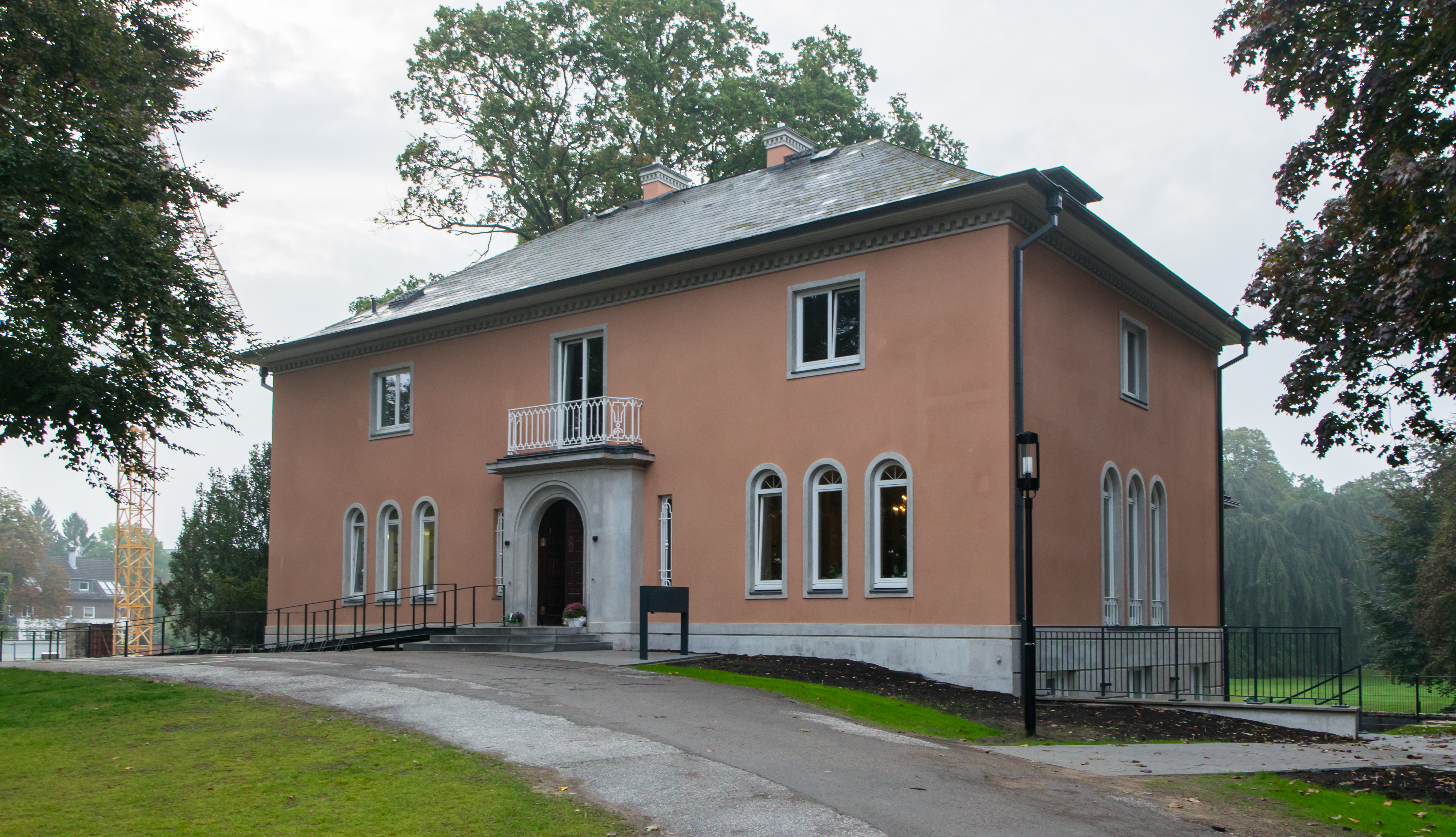 HH-Volksdorf Ohlendorffsche Villa